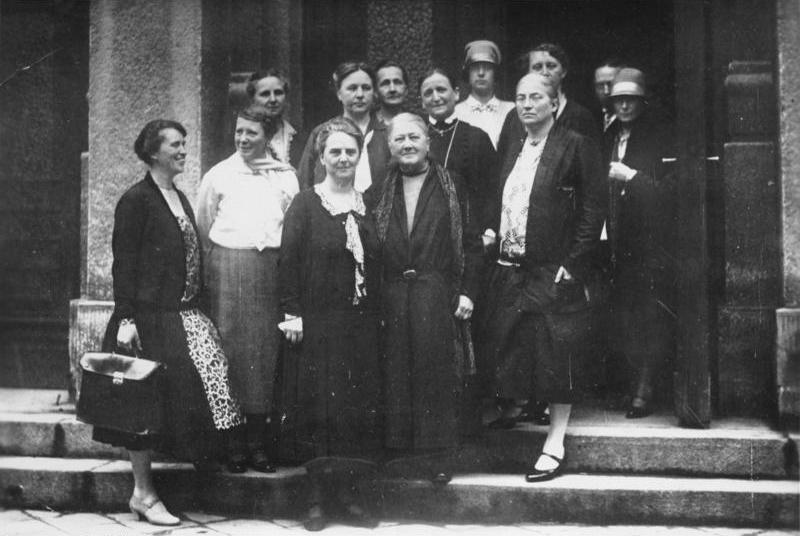 Scherl: Vom deutschnationalen Parteitag in Königsberg. Eine Gruppe der deutschnationalen Frauenvertreterinnen. v.l.: Frau Hielscher (M.d.L.), Frau von Sperber (M.d.R.), Frau Annagrete Lehmann (M.d.L.), dahinter Frau von Tiling (M.d.L.), Frau Dr. Behm (M.d.R.) dahinter Frau Deutsch (M.d.L.), Freiin von Watter (M.d.L.), Frau Müller-Otfreid (M.d.R.), dahinter Frau Scheidel (M.d.R.).